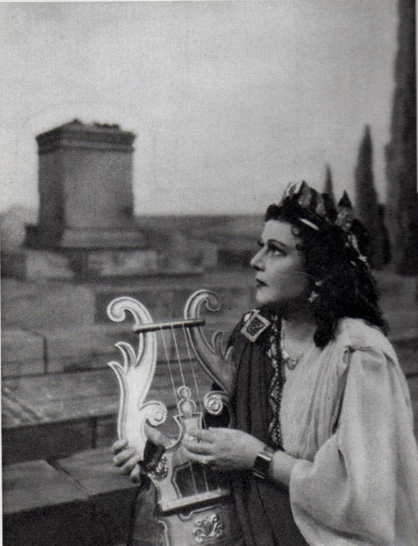 Virolaissyntyinen näyttelijä Liina Reiman Suomen kansallisteatterin näytelmässä "Sappho" vuonna 1945.